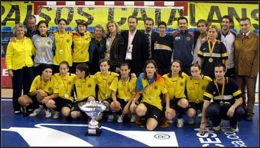 Catalunya campiona del 1r Mundial AMF a Reus (2008)